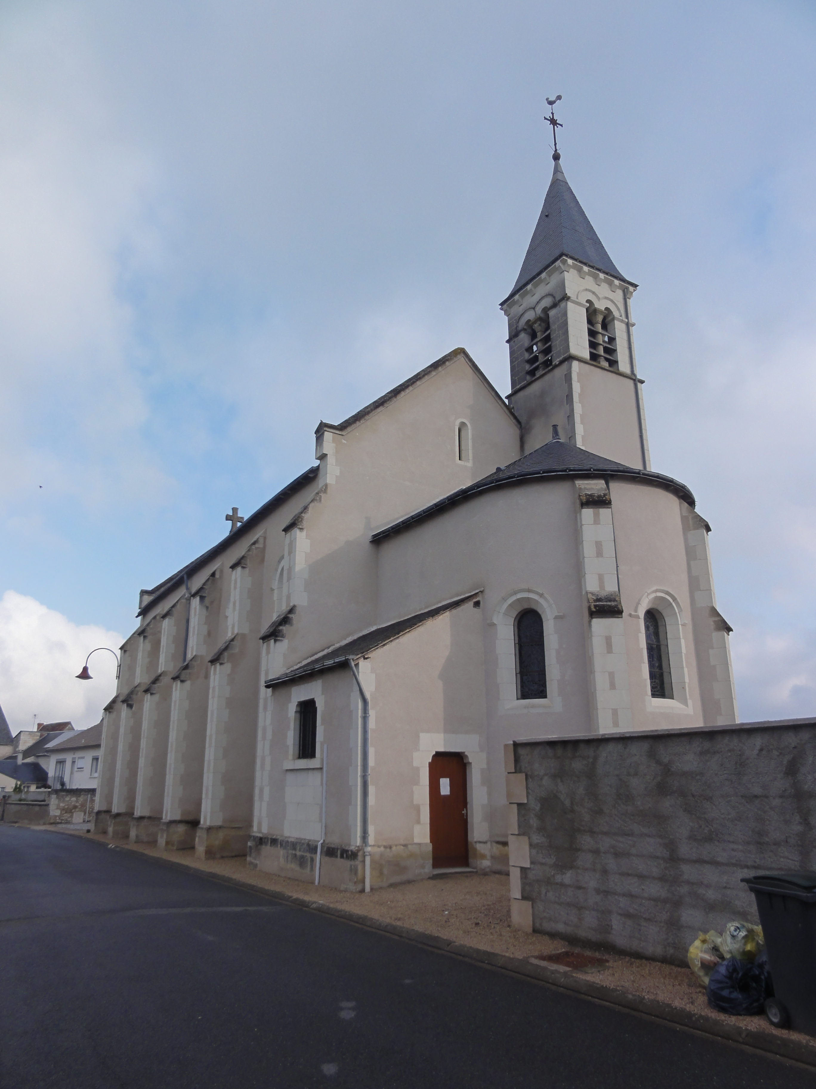 Port-de-Piles (Vienne) L'église Notre-Dame Immaculée